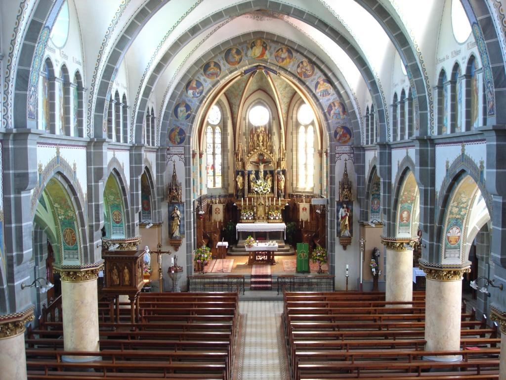 Inneres der Pfarrkirche St. Laurentius, Oggelshausen, Landkreis Biberach